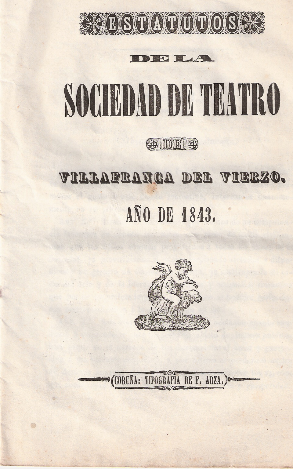 Foto da portada do exemplar do Estatutos da Sociedade de Teatro que fundou o Teatro de Vilafranca do Bierzo en 1843